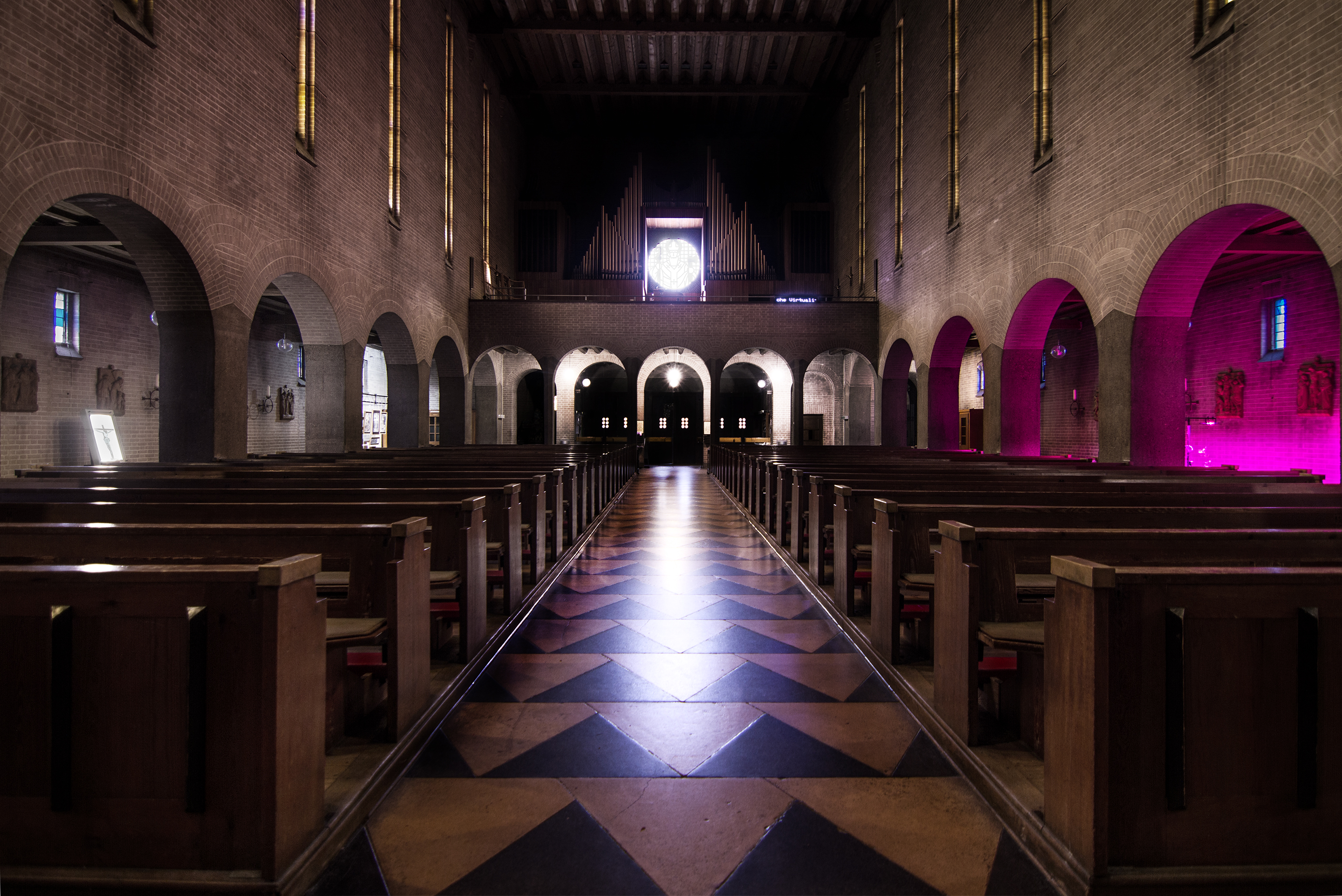 Blick auf die Orgel, Gruppenausstellung (waste and void), l.S. "PERSONAL JESUS" von Michael Merkel, M.r. "Ontology Generator" von Christian Doeller, r.S. "WINFRIED UND DIE EICHEN" von Sebastian Wanke